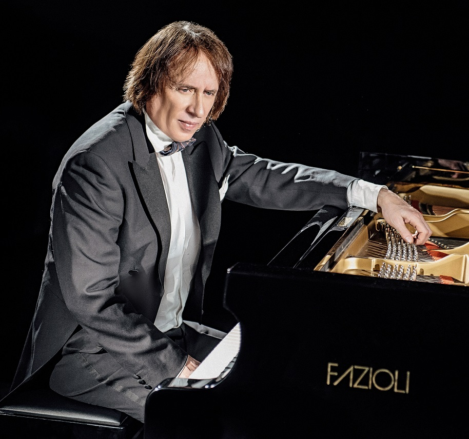 Композитор и исполнитель после сольного концерта